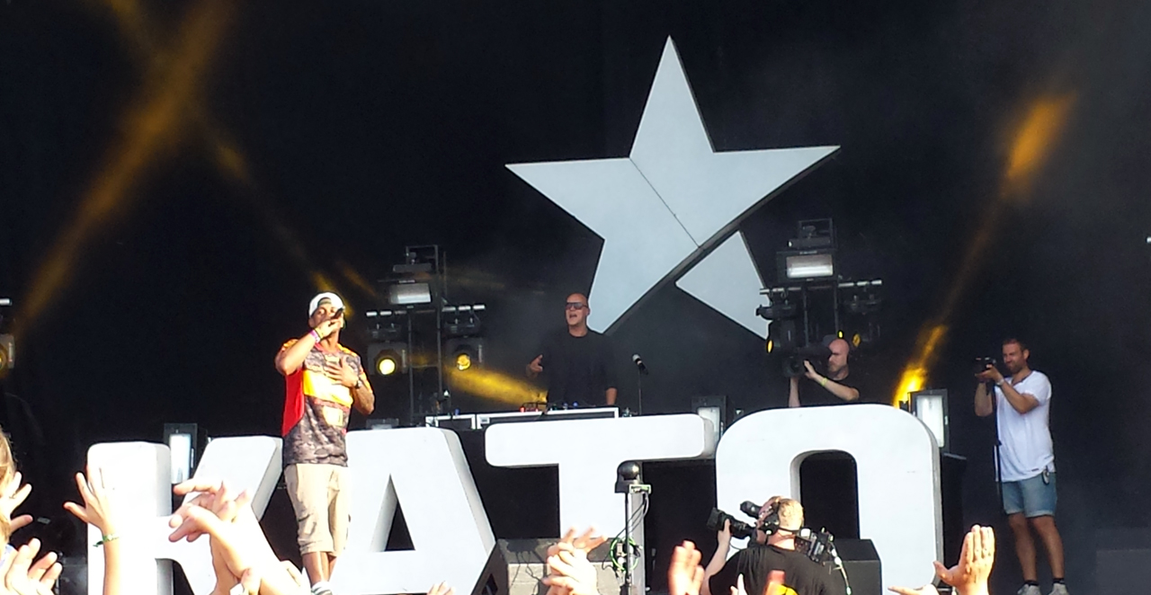 KATO optræder her til Grøn Koncert 2013 i Valby, København med Brandon Beal.